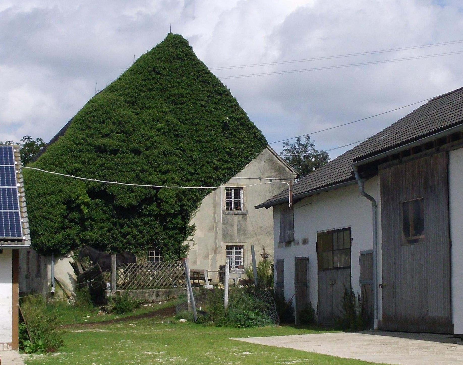 Hagenhof, Ortsteil von Treuchtlingen im Landkreis Weißenburg-Gunzenhausen